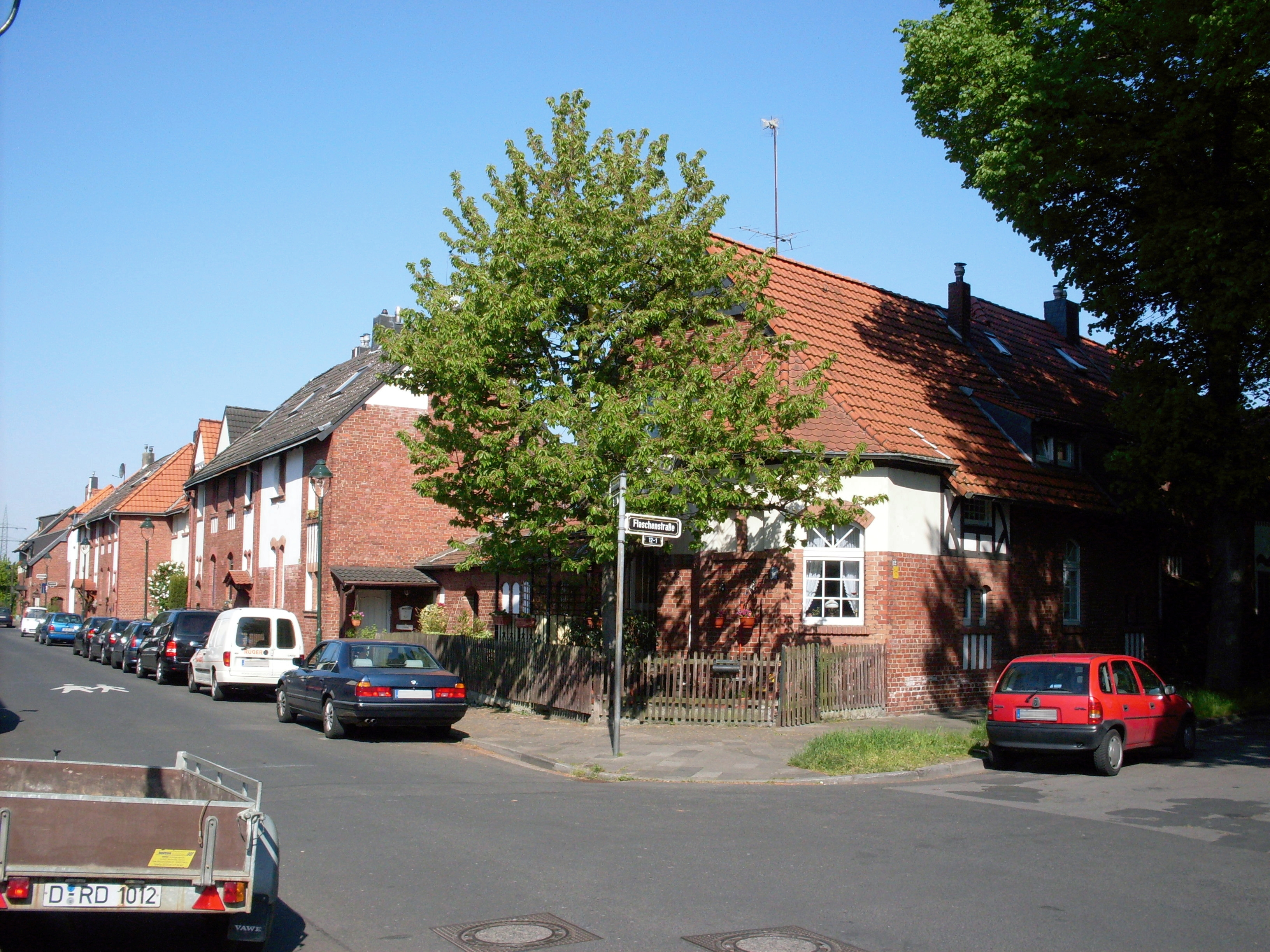 Düsseldorf-Gerresheim Meistersiedlung der Glashütte